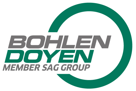 Logo Bohlen & Doyen GmbH